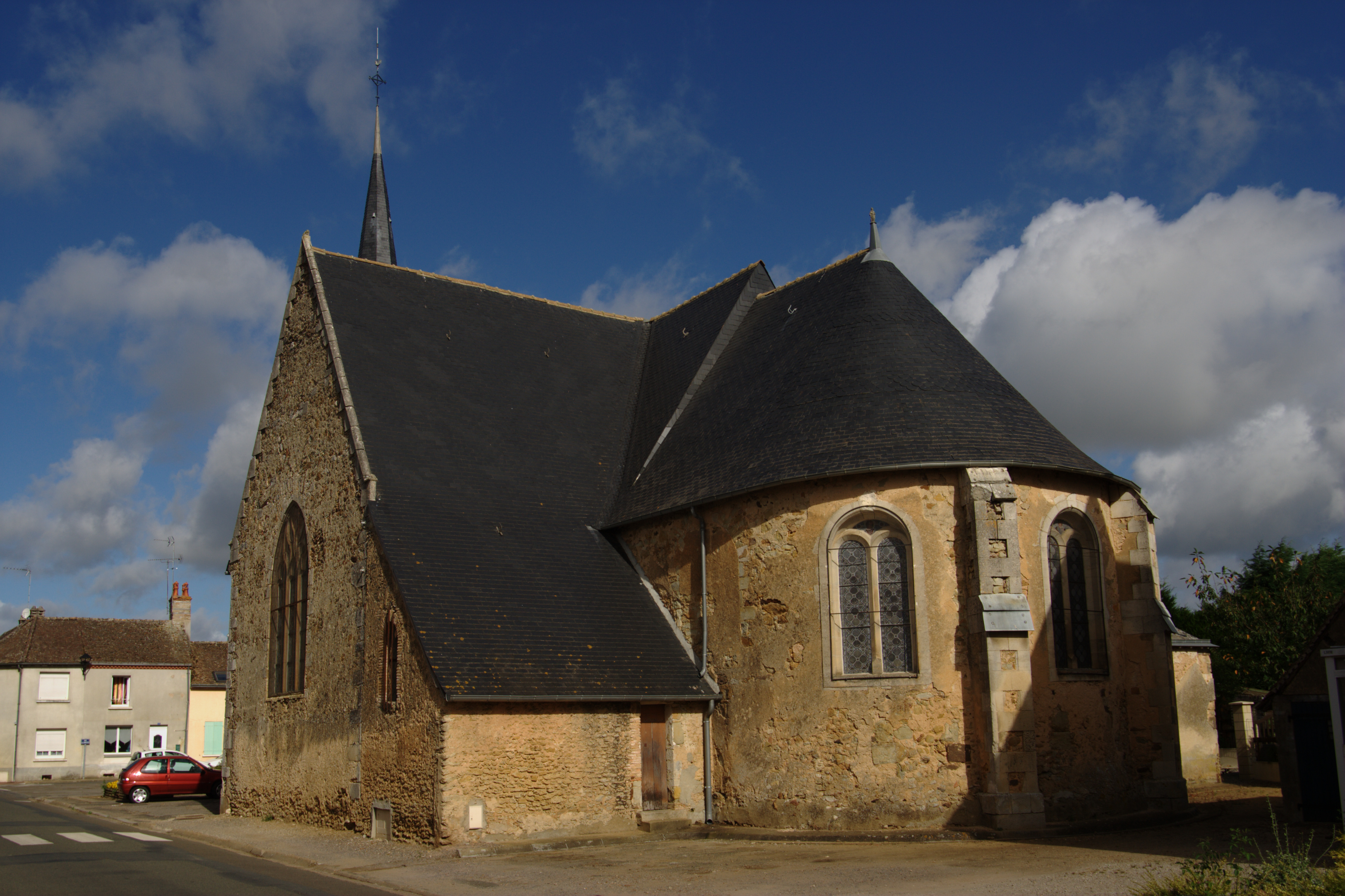 L'église Saint-Barthélemy de Courcemont.